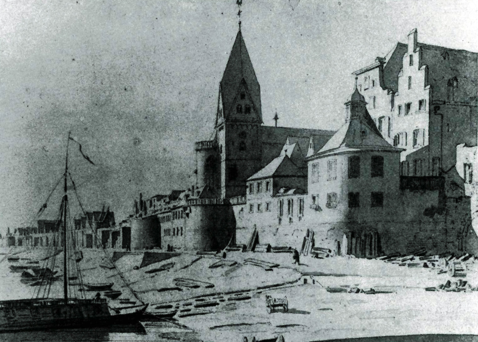 St. Maria Lyskirchen, Köln. Lithographie aus dem Jahr 1827. Die zu dieser Zeit, vor der Entstehung des Rheinauhafens, noch leicht erhöht am Ufer stehende Kirche mit Resten der südöstlichen Uferbefestigung der Stadt.